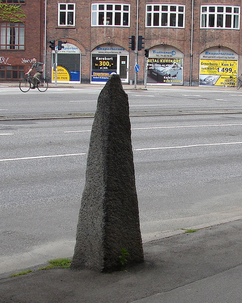 Druknestenen, Åboulevarden, København